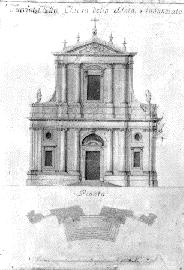 Casa dell'Annunziata Obrázek převzat z Je zřejmé, že jde o . V celé stránce " " není žádná zmínka o copyrightu.